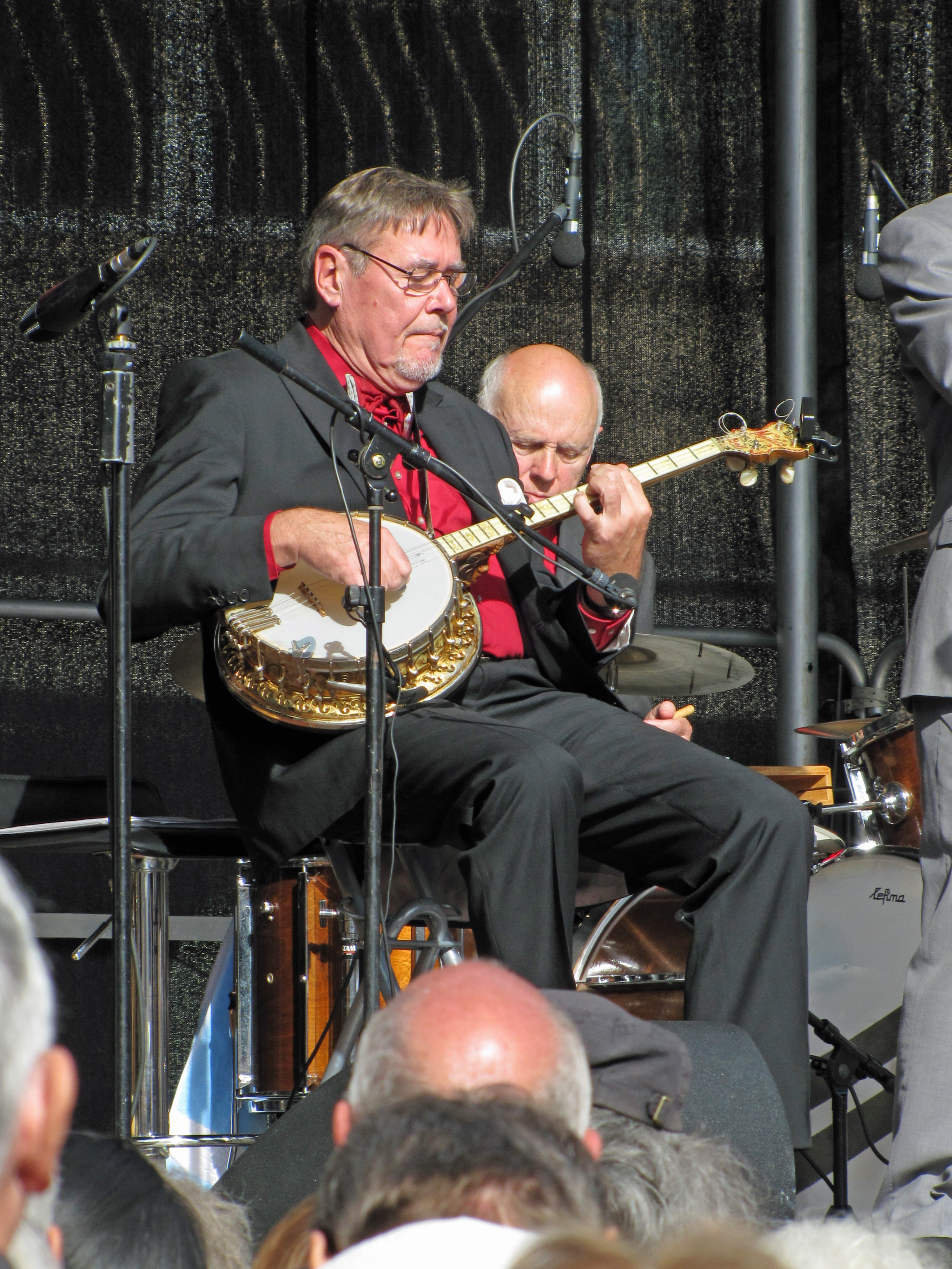 Bernd K. Otto von den "Red Hot Hottentots", bei "Jazz zum Dritten" 2013, auf dem Römerberg in Frankfurt am Main.